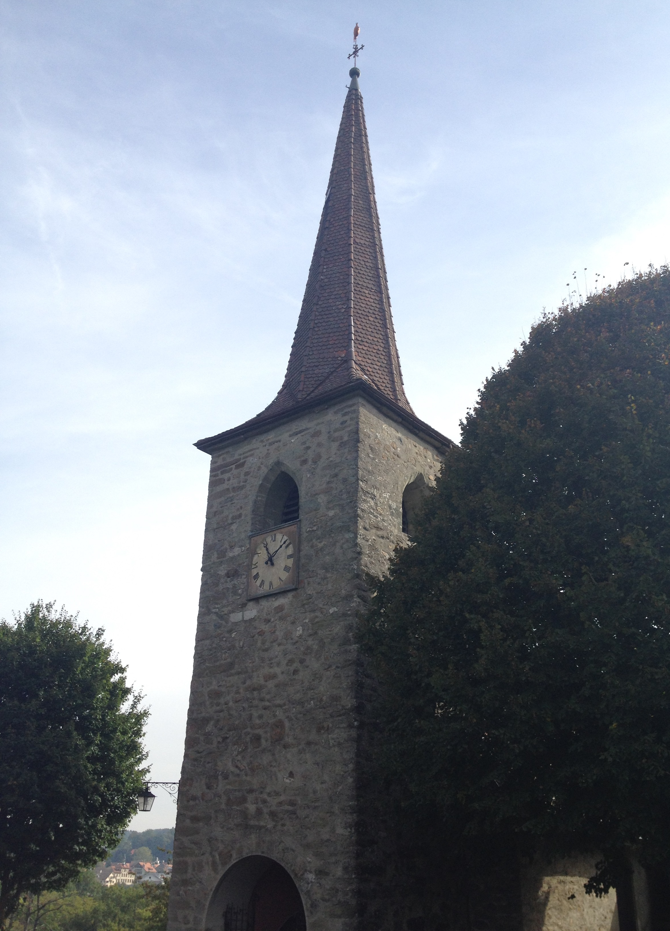 L'église Saint-Maurice-et-Saint-Pancrace de Châtillens en Suisse.